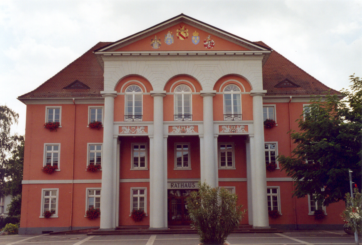 Kehl : Vorderseite des Rathauses, erbaut 1815 und 1921. In Baden eines der schönsten Beispiele für die Verquickung Klassizismus - Neoklassizismus. Beide Anteile wurden konsequent im Weinbrenner-Stil ausgeführt. Die auffälligste Partie, der monumentale Mittelrisalit entstammt der Bauphase von 1921.